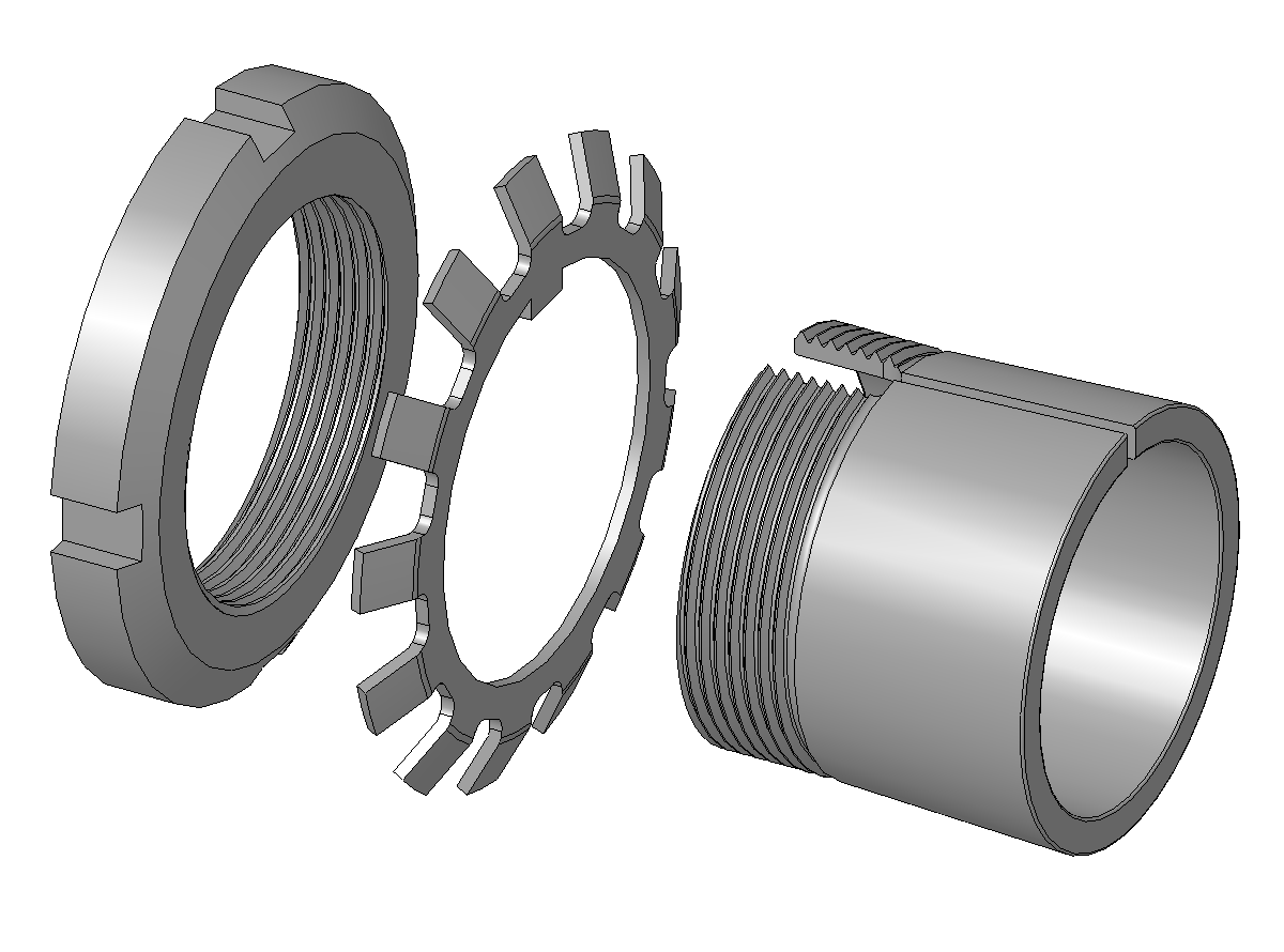 de: Spannhuelse mit Nutmutter (DIN981) und Sicherungsblech (DIN5406) wie sie für die Befestigung von Waelzlager mit kegeligem Innendurchmesser bis 200mm verwendet wird. Waelzlager ueber 200mm werden auch mit Nutmutter und Sicherungsbuegel (ebenfalls nach DIN5406; hier nicht dargestellt) gesichert. Das Kegelverhältnis der Spannhülse nach DIN5415 beträgt 1:12. Zum Lieferumfang einer Spannhuelse nach DIN5415 gehoehren, wie hier dargestellt, neben der Spannhuelse auch die Nutmutter und die Sicherungselemente (hier: Sicherungsblech). Von links nach rechts: Nutmutter (DIN981) Sicherungsblech (DIN5406) Spannhuelse (DIN5415)